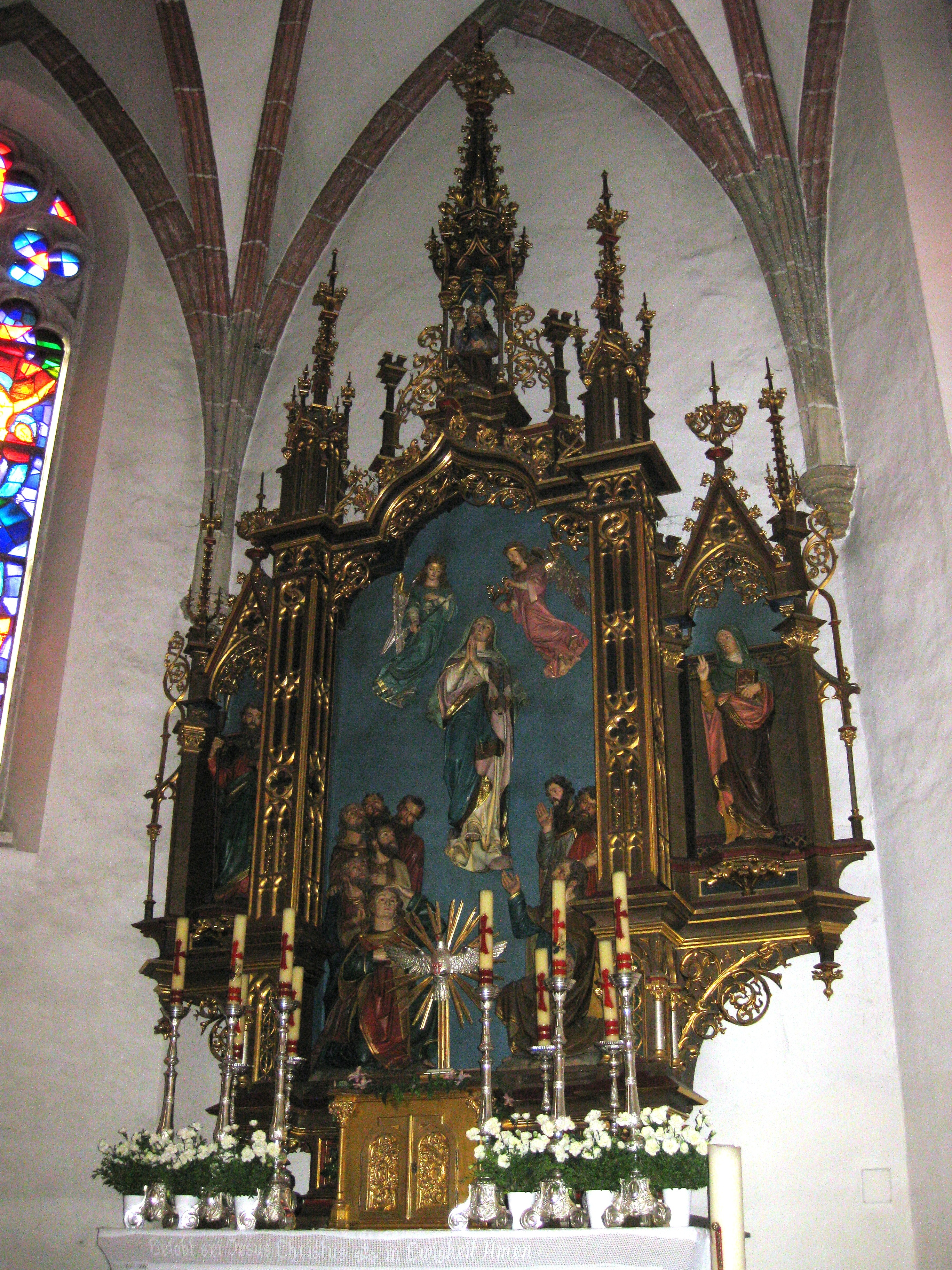 neogotisch, 1894, Linsner